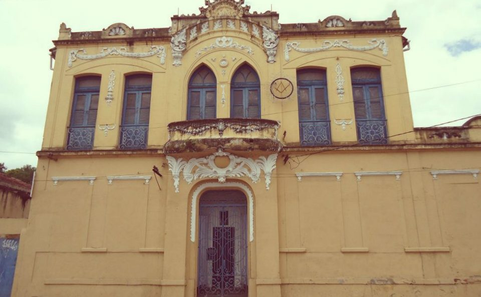 Loja Maçônica ARLS José de Souza Marques